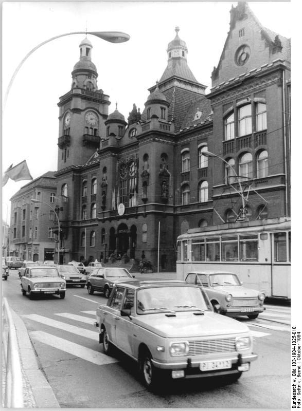 ADN-ZB Settnik 25.10.84 Berlin: Rathäuser Das Pankower Rathaus verrät schon durch das Äußere sein Alter. Es ist eine Vereinigung mehrerer historischer Architekturstile, modifiziert im Sinne der Stilkunst der Jahrhundertwende. Für die damals erhebliche Summe von 485.000 Mark schuf es der Architekt Wilhelm Johow als das zweite Vorort-Rathaus Berlins. 1903 wurde es seiner Bestimmung übergeben. Die "Bürgertugenden", versinnbildlich in den Sandsteinfiguren an dern Fassade, weisen den Bau als ein Rathaus des aufstrebenden Bürgertums aus. Heute vertreten hier die Abgeordneten des drittgrößten Stadtbezirkes der Hauptstadt die Interessen der 136 000 Einwohner.